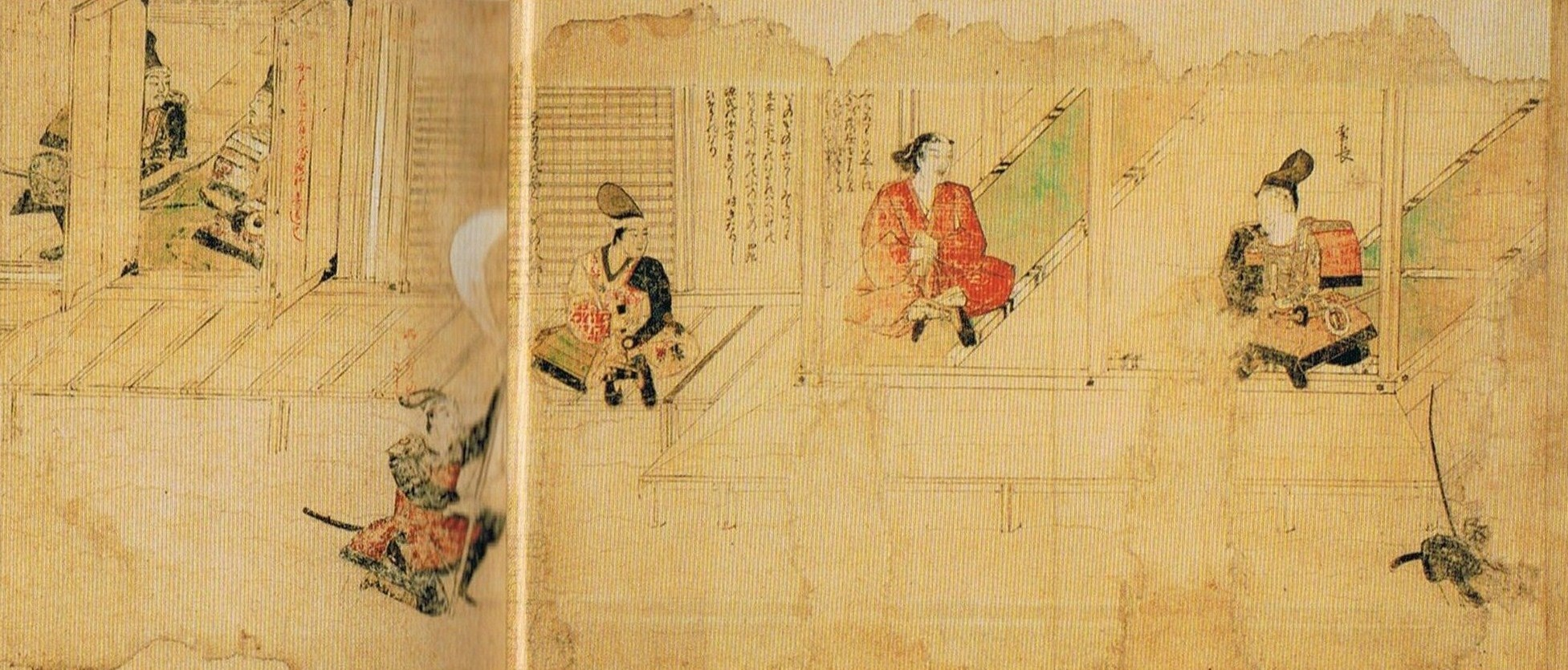 『蒙古襲来絵詞』後巻【絵十一】負傷した河野通有を見舞う竹崎季長。